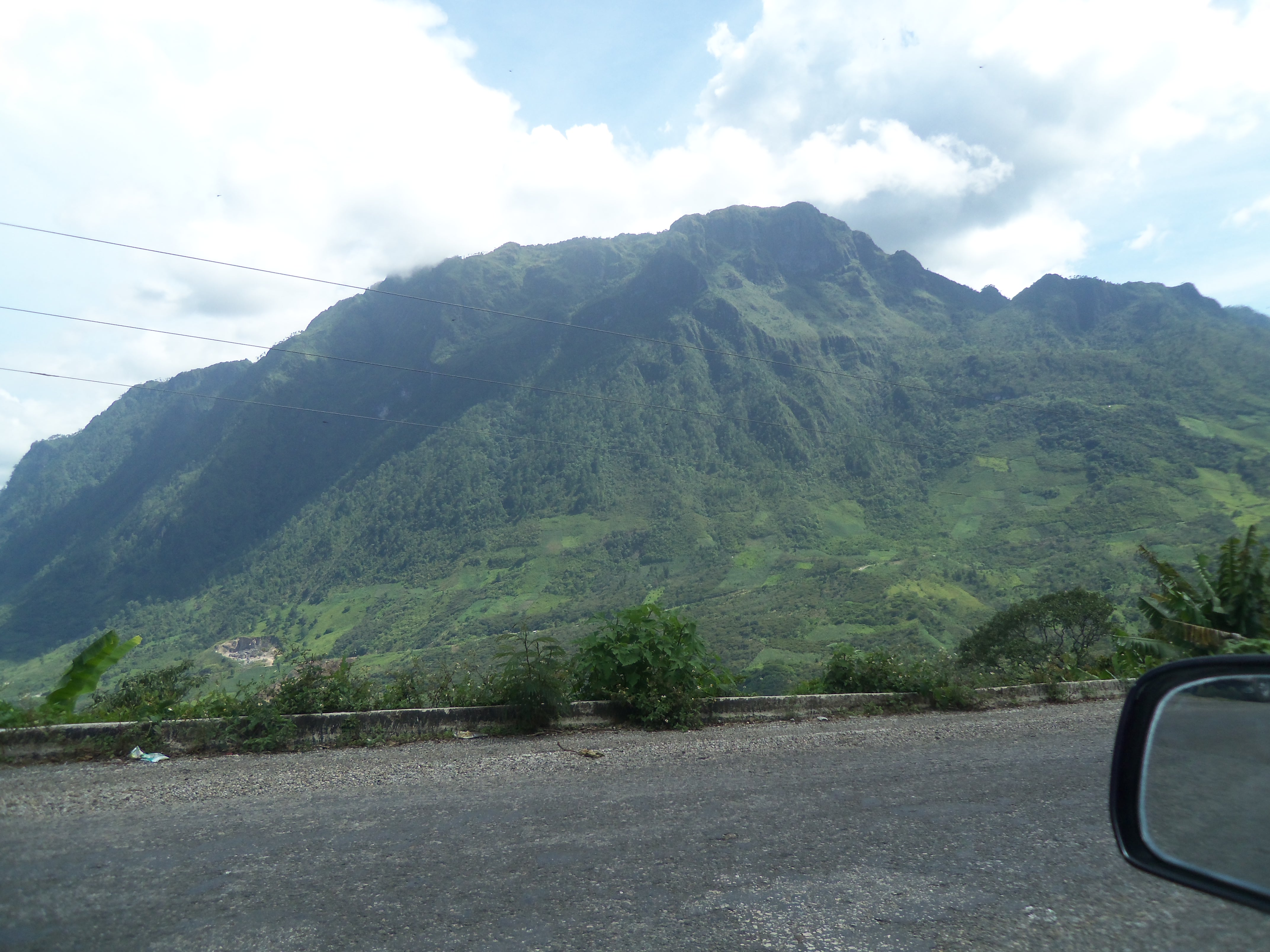 paisaje del municipio el bosque